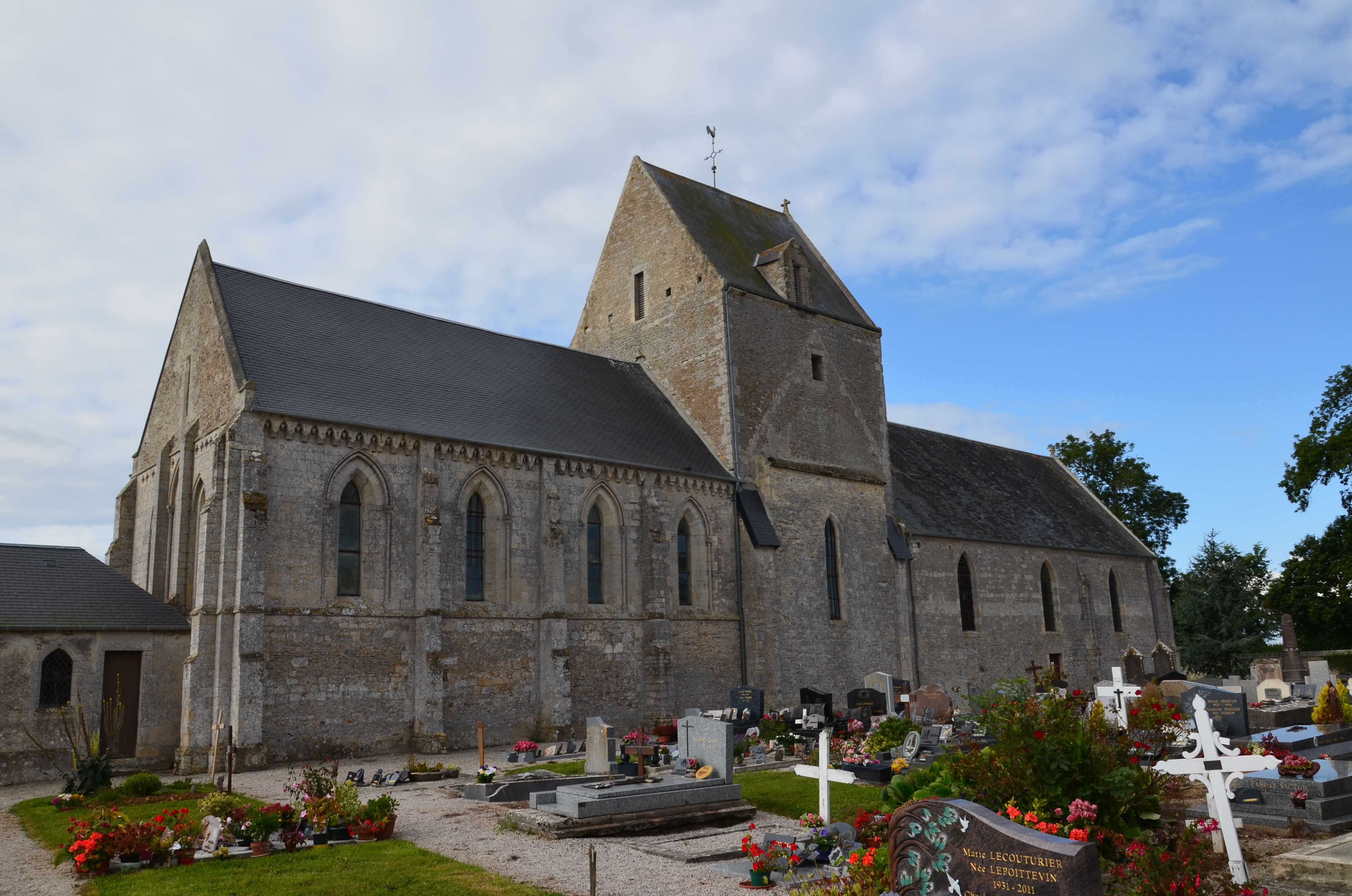 Église Saint-Pierre de Géfosse-Fontenay.